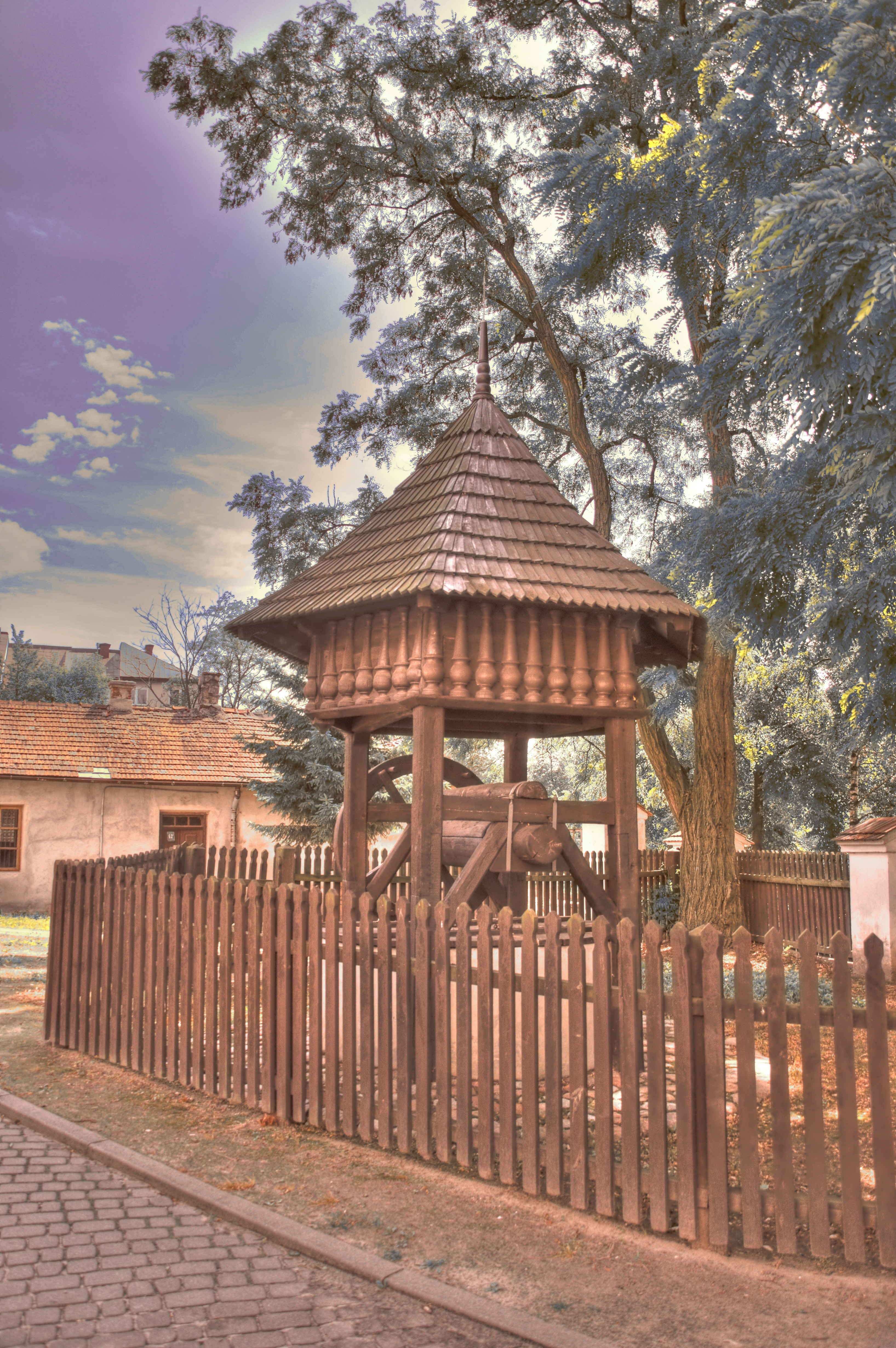 drewniana studnia, znajdująca się obok kościoła p.w. Św. Agnieszki w Lublinie, przy ul. Kalinowszczyna. Obiekt wpisany do rejestru zabytków pod nr A/139 z 05.08.1996. Zdjęcie wykonane w technice HDR.